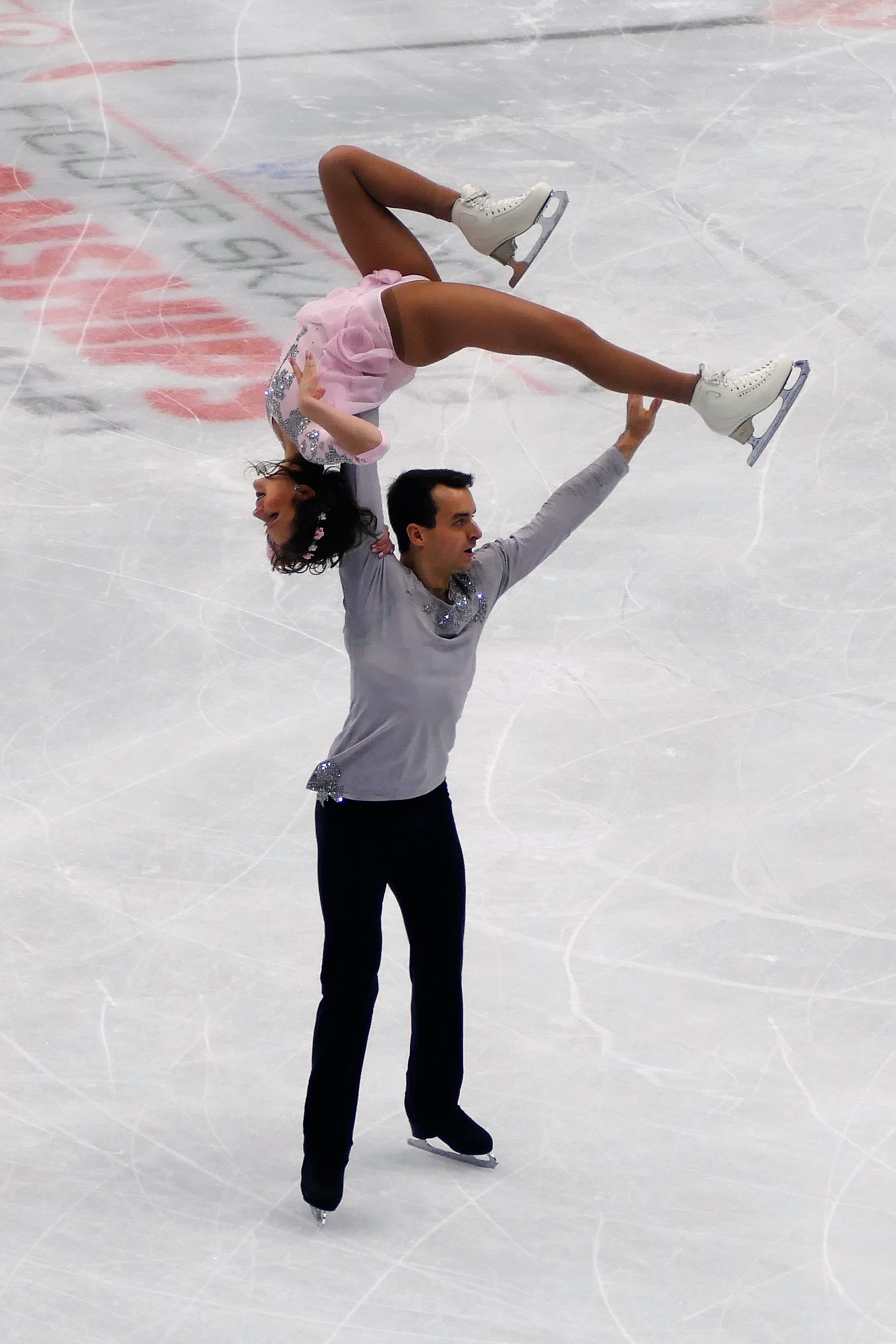 Annika Hocke und Roben Blommaert bei der Kür der Europameisterschaften im Eiskunstlaufen 2018 in Moskau